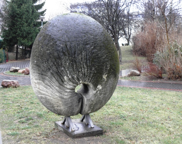 autor: Stefan Wierzbicki - polski artysta, rzeźbiarz